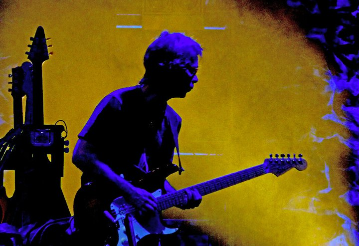 Foto del concierto de Dave Mathews Band en Santiago de Chile, año 2010, Movistar Arena.